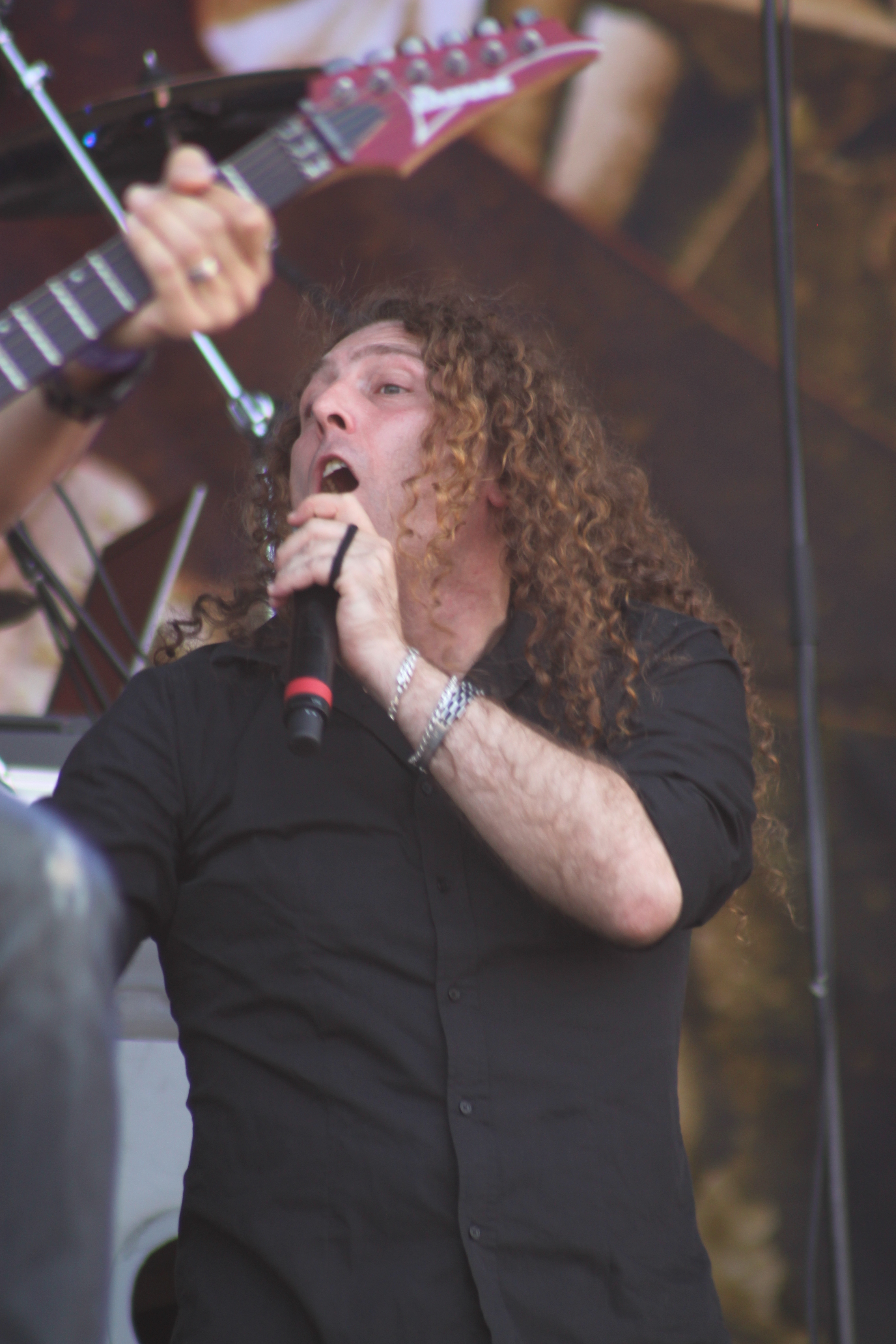 Hellfest 2014. Fabio Lione, Angra. Fr-44-Clisson.